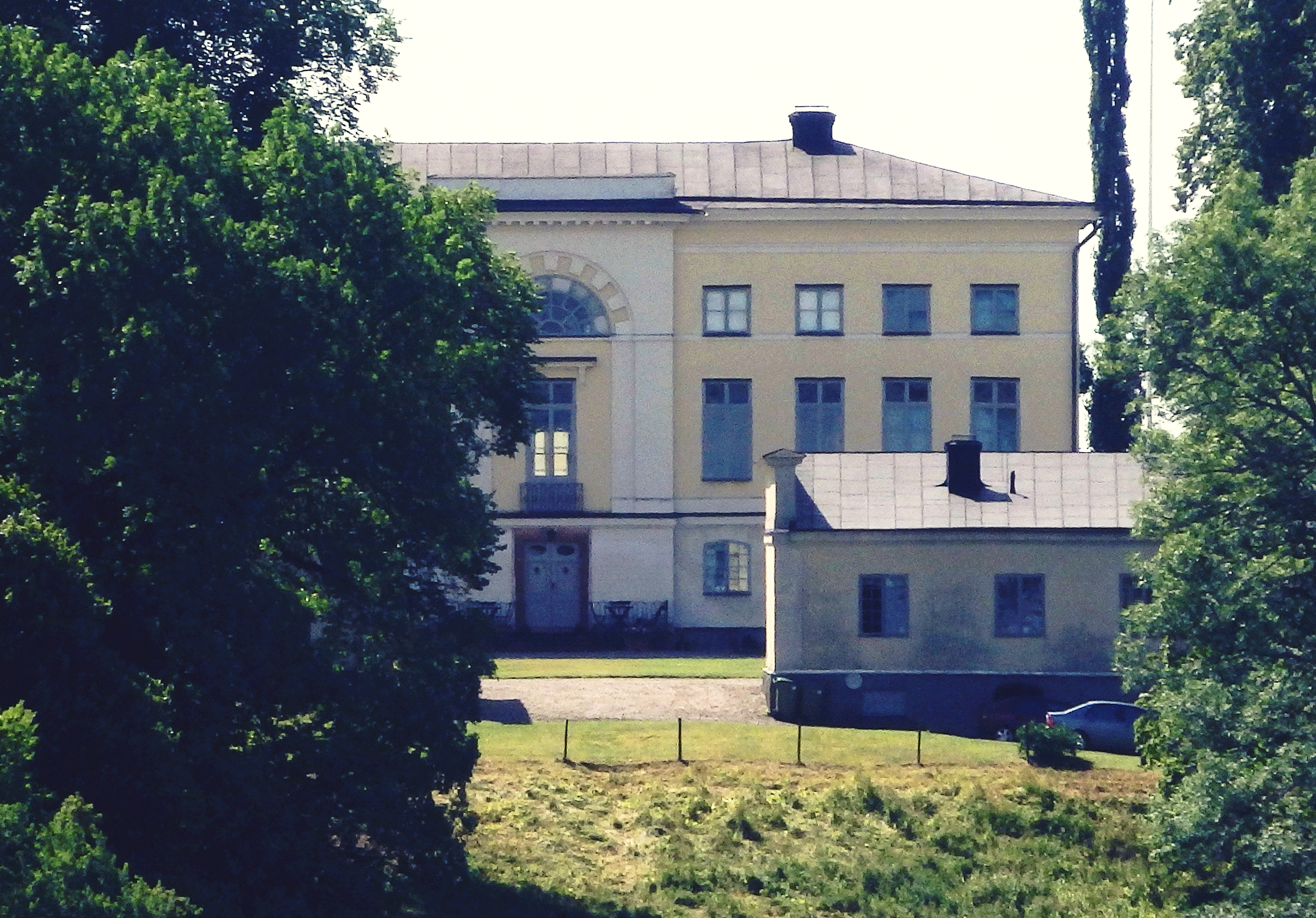 Ulvåsa